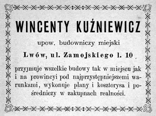 Реклама фірми будівничого Вінцентія Кузневича (1846-1902) у путівнику Ilustrowany przewodnik po Lwowie i Powszechnej wystawie krajowej за 1894.